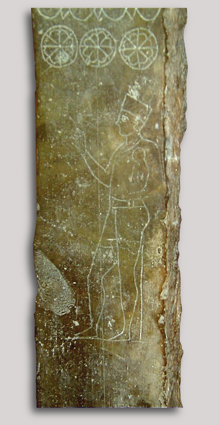 stèle du prêtre, découverte à carthage en 1921, musée du Bardo